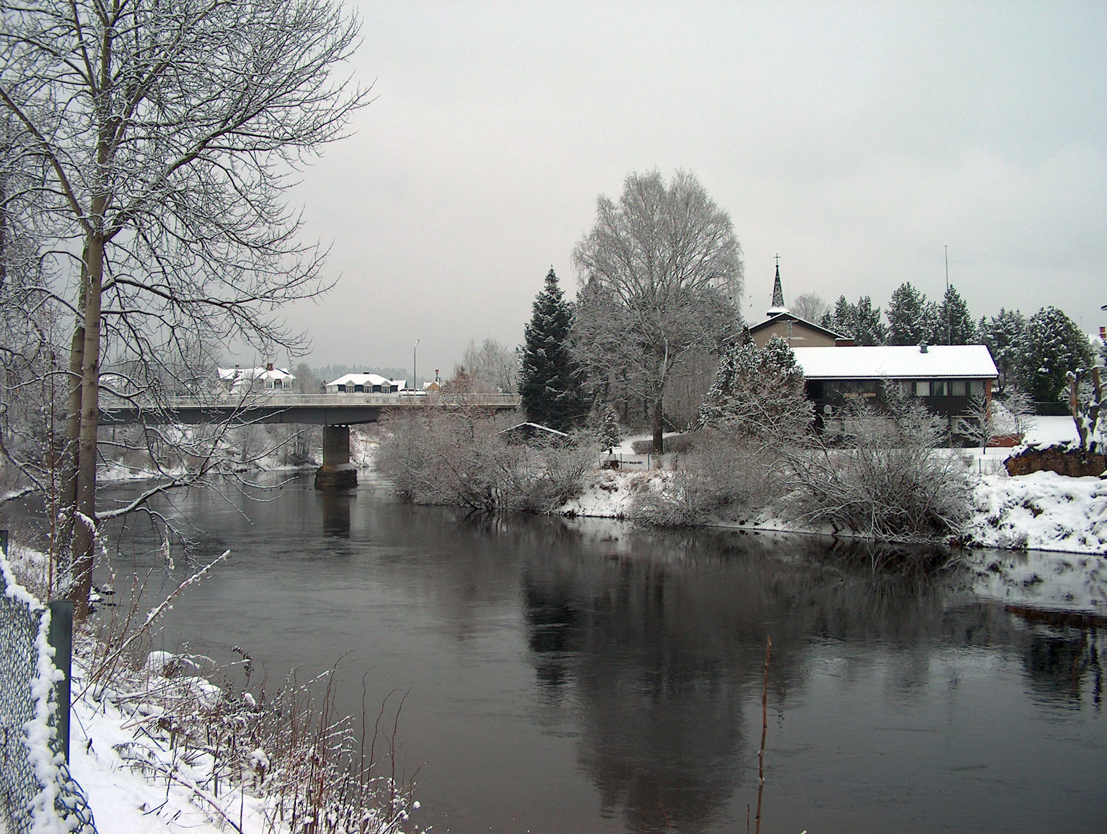 Vinteridyll ved Randselva